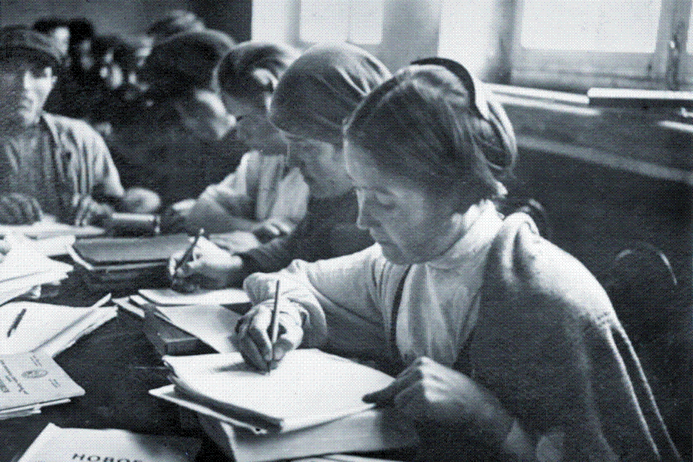 Занятия по ликвидации неграмотности, Чебоксары, 1930-е годы. [1]